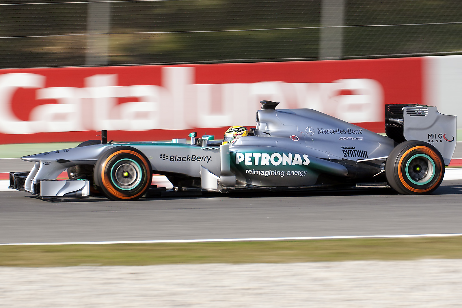 F1 Tests - Circuit de Catalunya, Spain.